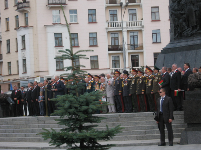 А.Г. Лукашенко и главы гос-ва РБ на пл.Победы, Минск, на День Независмости